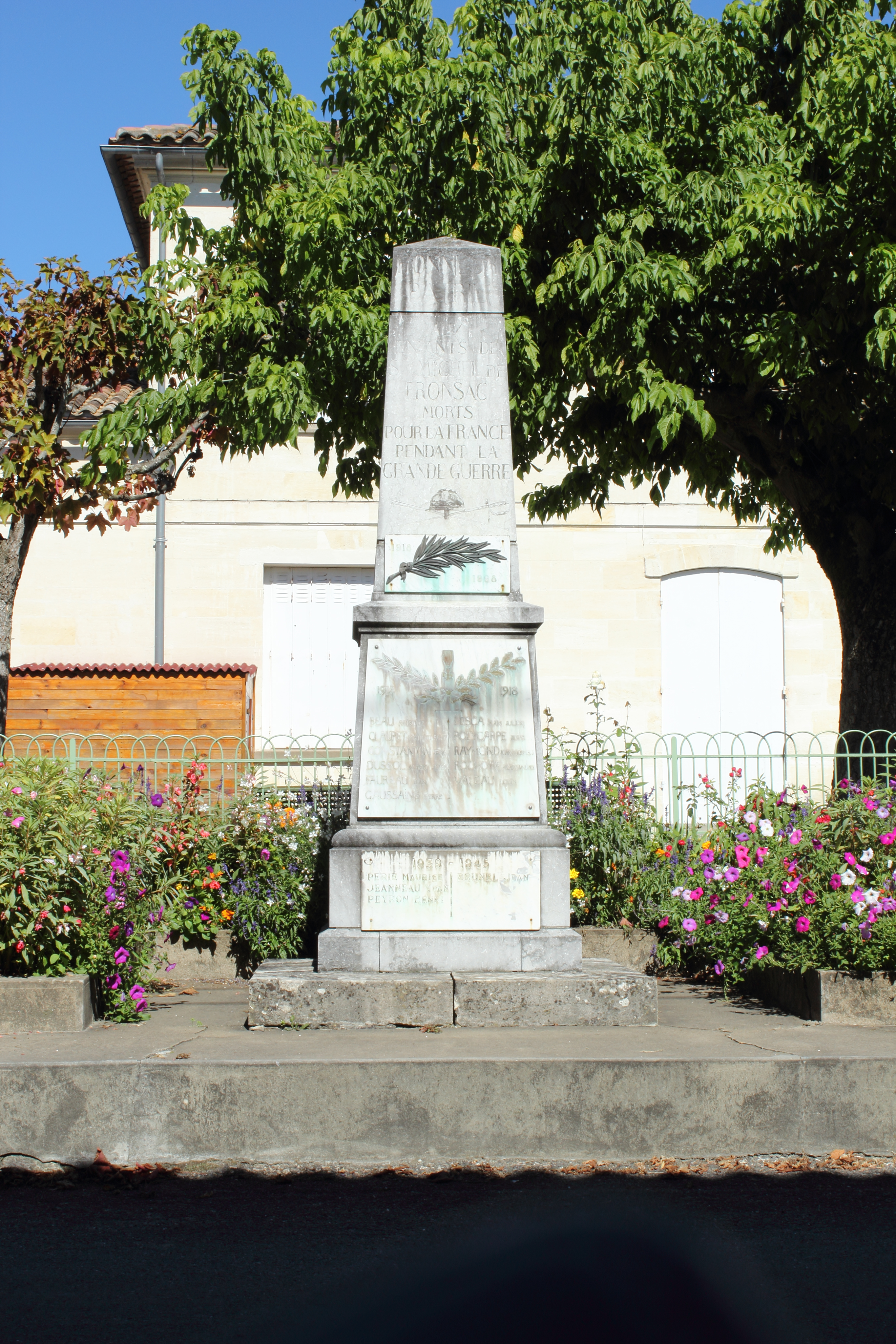 Vue du monument aux morts de Saint-Michel de Fronsac